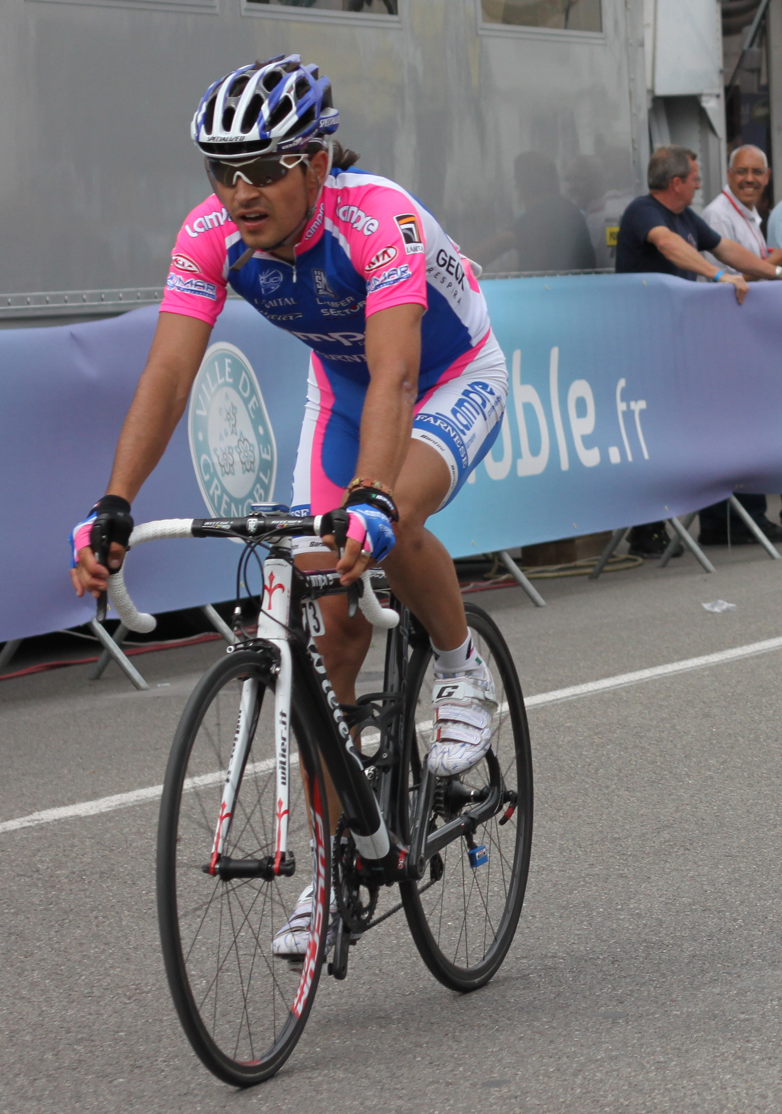 Vitaliy Buts à son arrivée à Grenoble après la 5e étape du Critérium du Dauphiné 2010